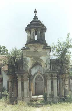 Manthirimanai photographed by Mr.Ketheeswaranathan for R.Mayooranathan in the year 2002.